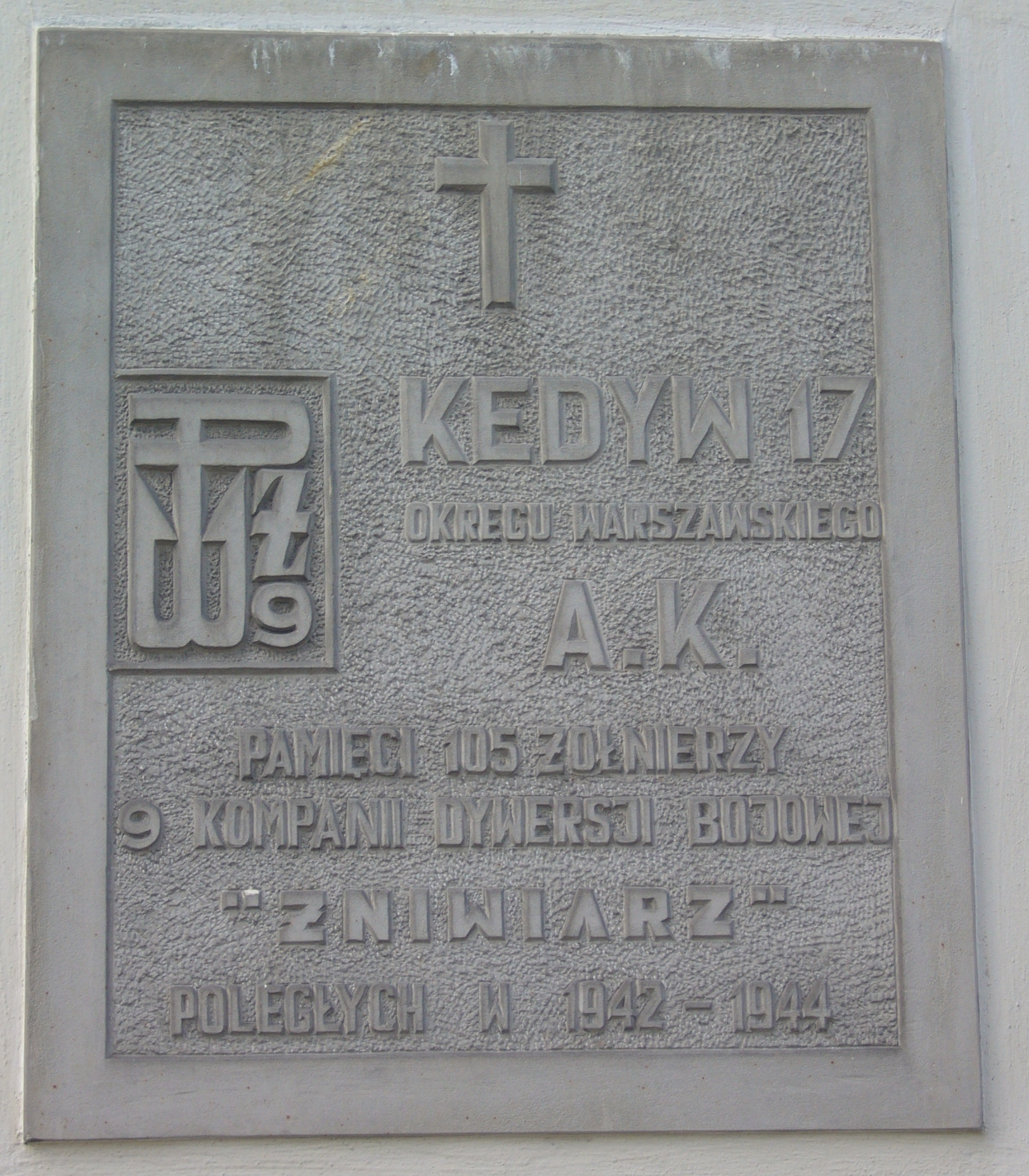 Tablica upamietniajaca poleglych zolnierzy zgrupowania AK Żniwiarz